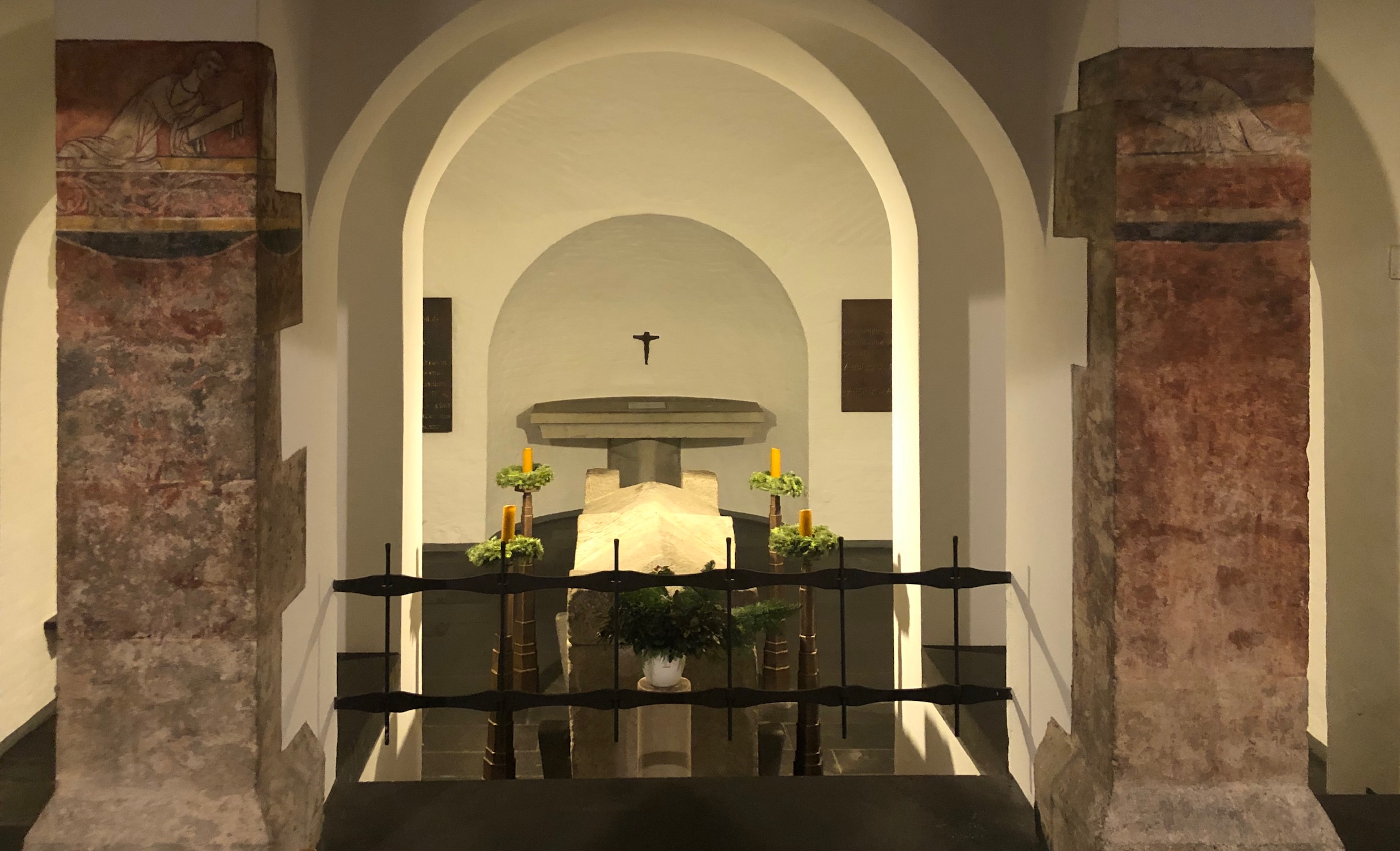 Krypta mit dem römischen Sarkophag des Albertus Magnus in St. Andreas, Köln, Deutschland